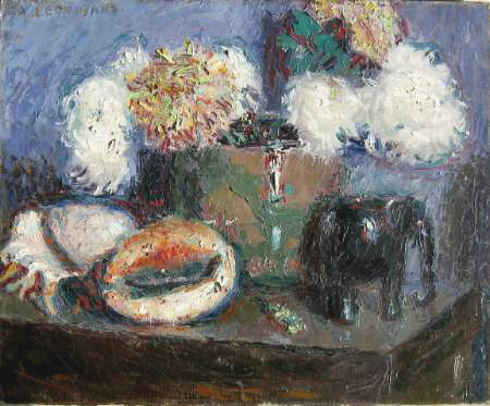 Photo d'un tableau (Nature morte au Chrysanthèmes, par Léon Gard) dont je suis le propriétaire et l'ayant droit.